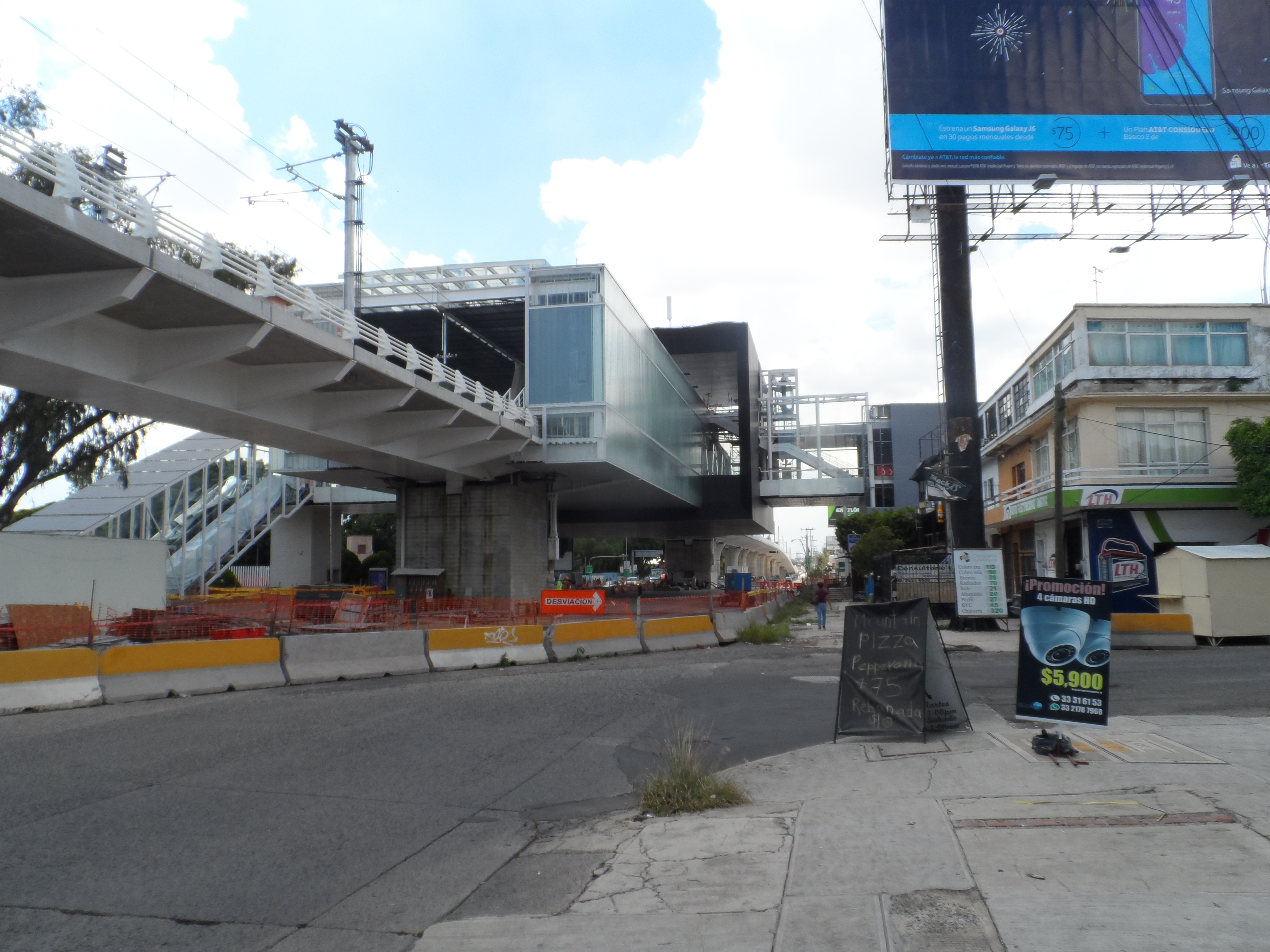 Vista externa de la estación "CUCEI" de la Línea 3 del Tren Ligero de Guadalajara.